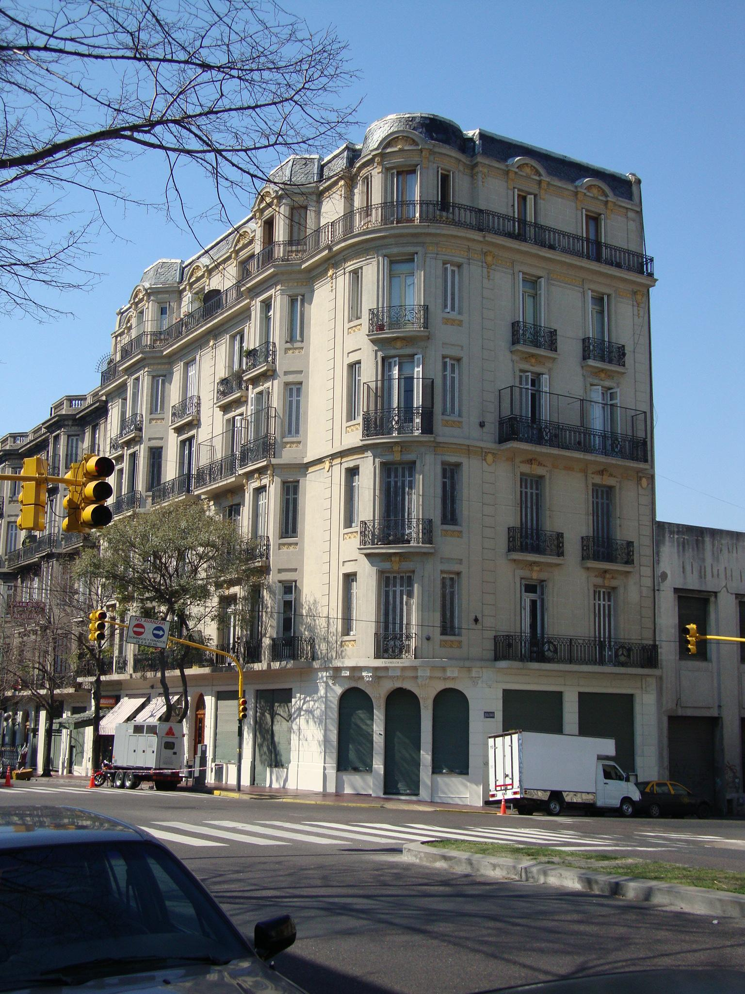 Edificio de departamentos en Avenida Caseros, entre las calles Bolívar y Defensa. Proyectado por el arquitecto Christian Schindler. Barracas, Buenos Aires, Argentina.